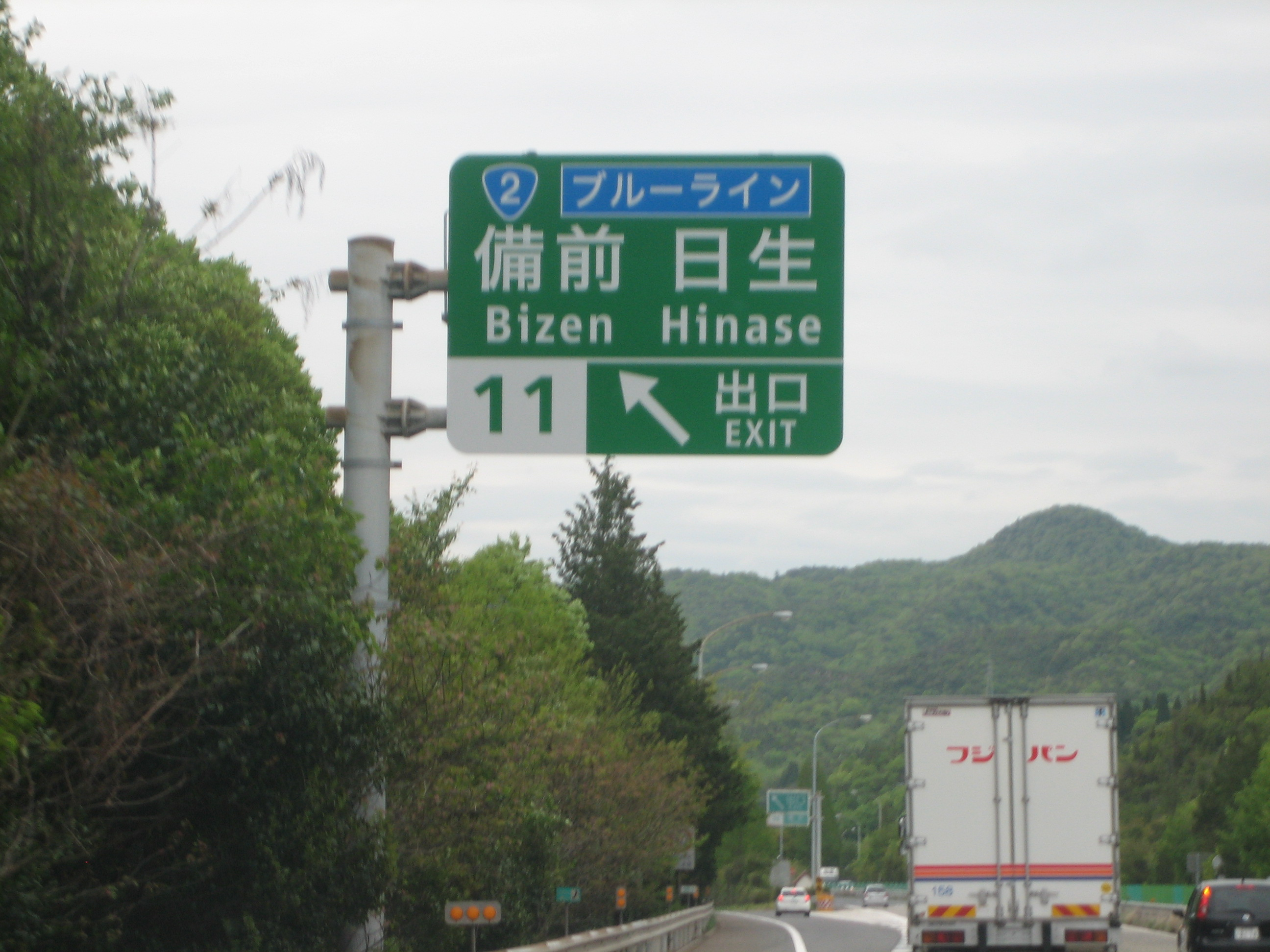 備前IC下り線出口